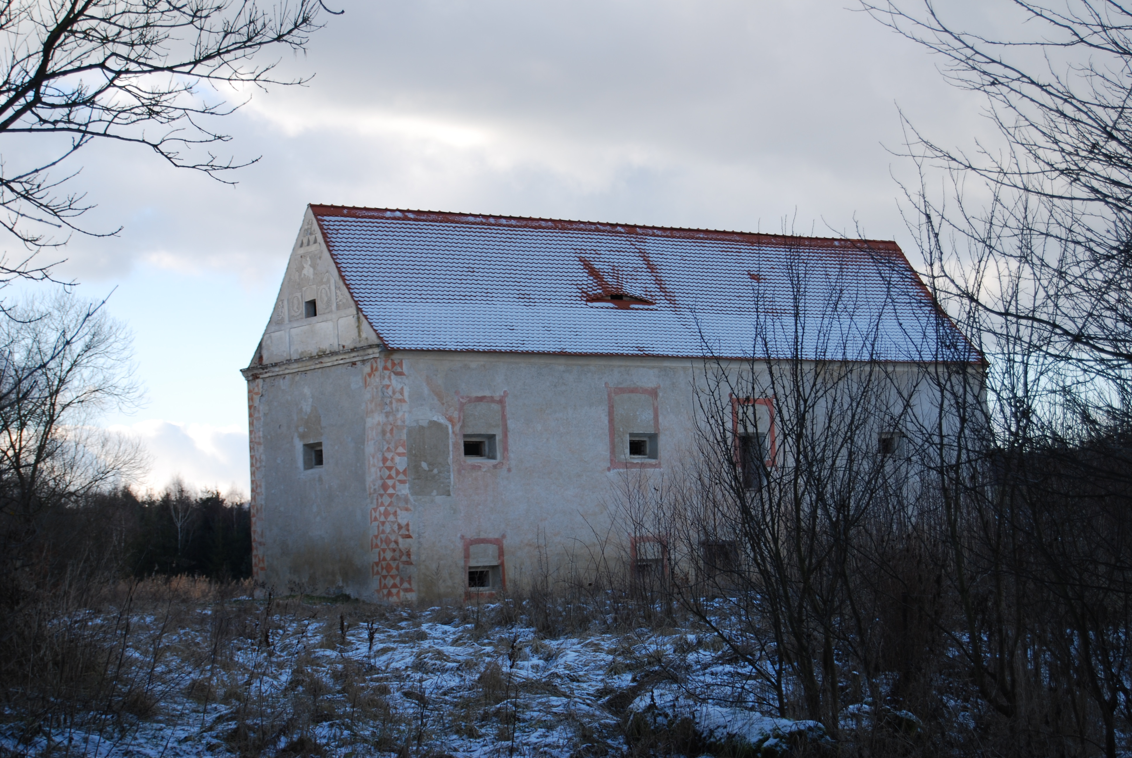 Údraž čp. 1. Údraž je část obce Albrechtice nad Vltavou v okrese Písek. Česká republika.